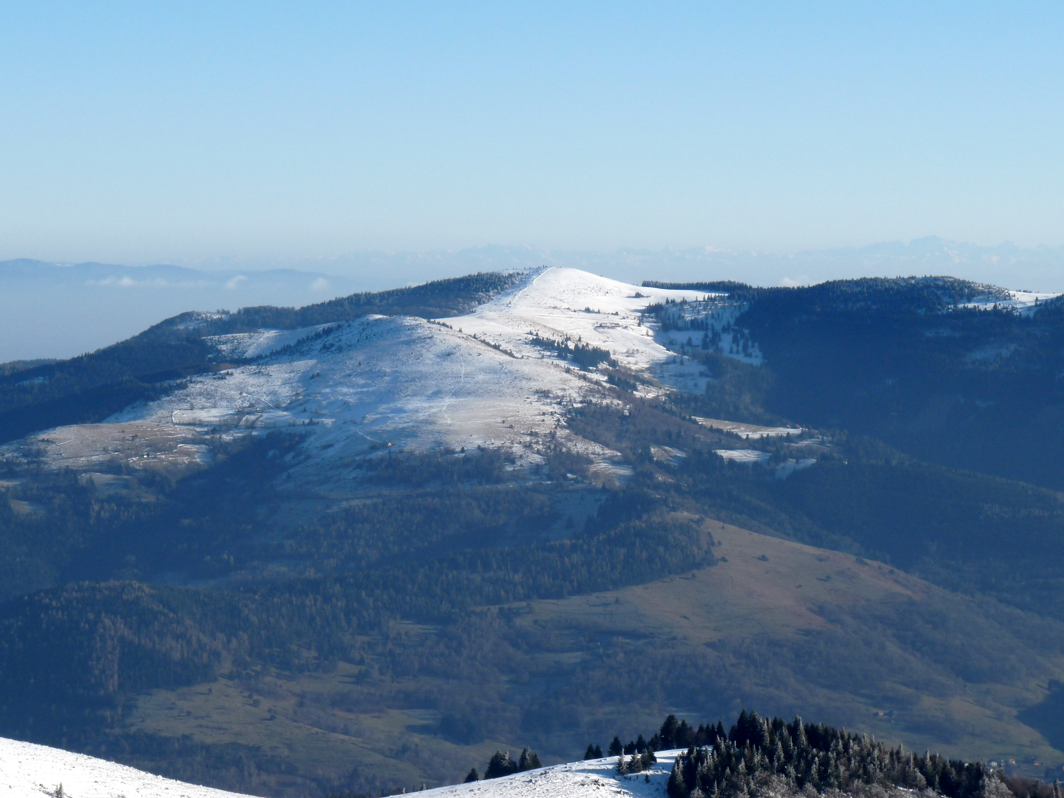 Le Petit Ballon vu depuis le Hohneck (massif des Vosges)